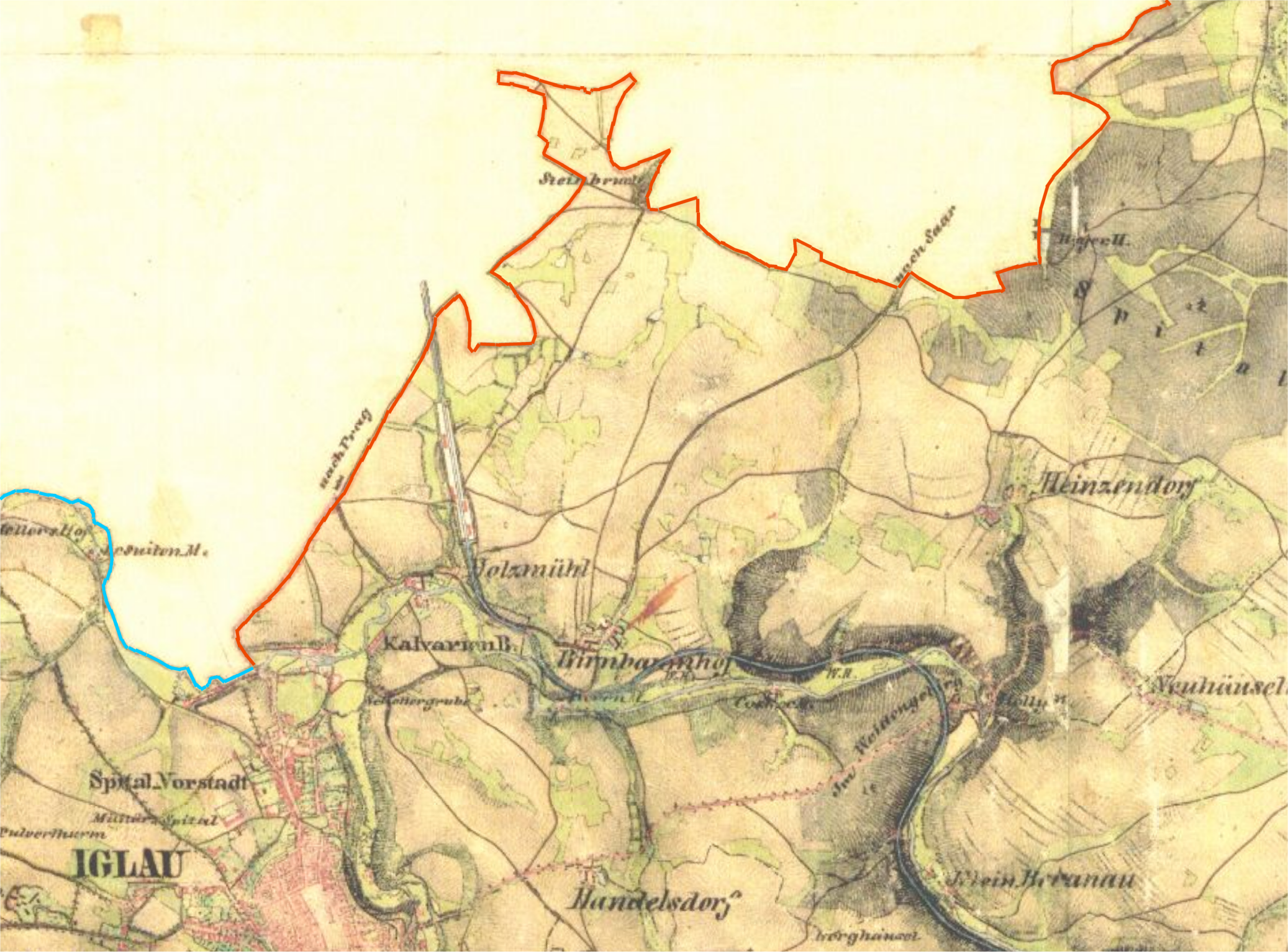 Výřez z listu mapy II. vojenského (Františkova) mapování, na níž je zakreslen průběh zemské hranice Čech a Moravy na území dnešní Jihlavy Hranici zvýraznil wikipedista Kirk. Červeně je zvýrazněna na souši, bleděmodře na řece Jihlavě Na mapě nejsou zakresleny české části moderní Jihlavy. Holzmühl i Kalvarien jsou v současnosti součástí pravidelné zástavby města Jihlavy.